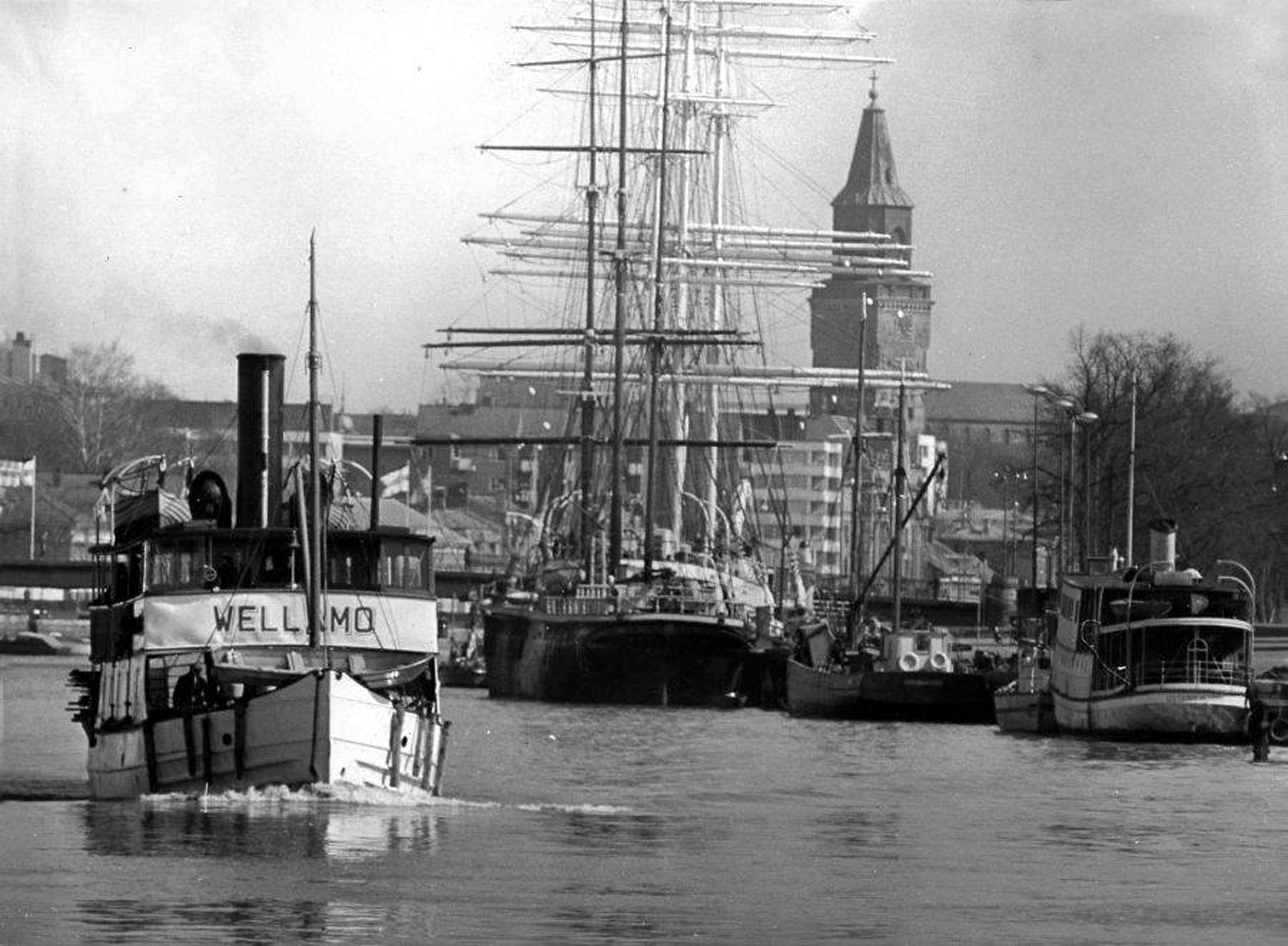 s/s Wellamo Aurajoessa